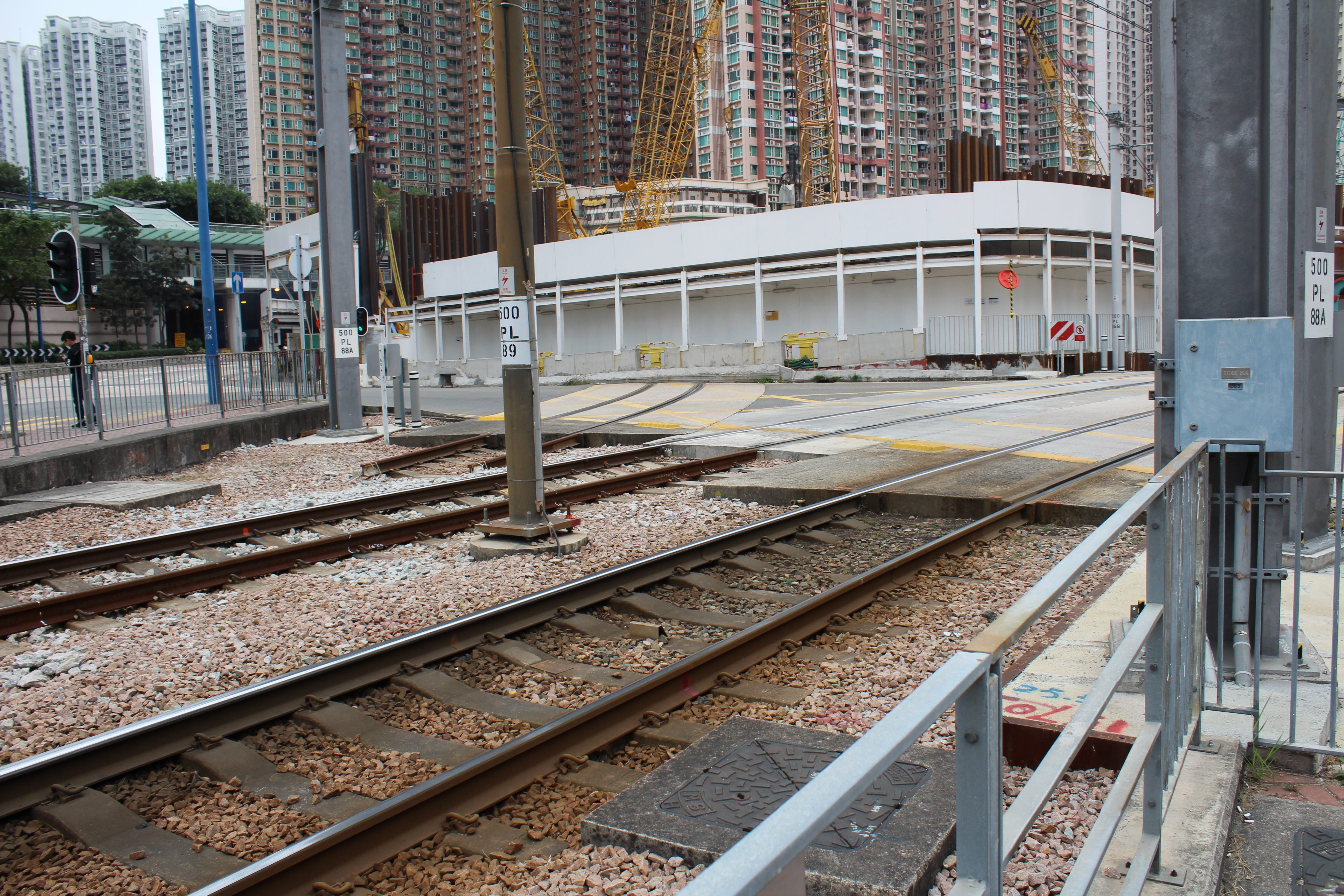 輕鐵天榮站